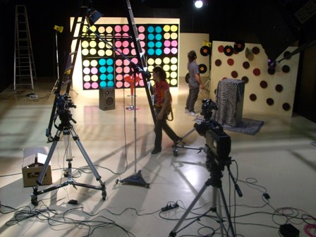 Ejemplo de un programa de TV que utilizó este formato de Guión televisivo.